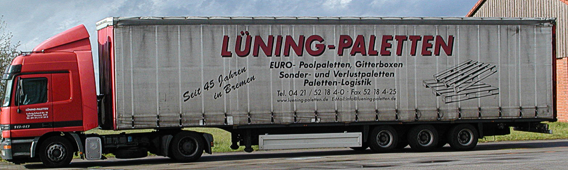 Ein Auflieger "Tautliner"